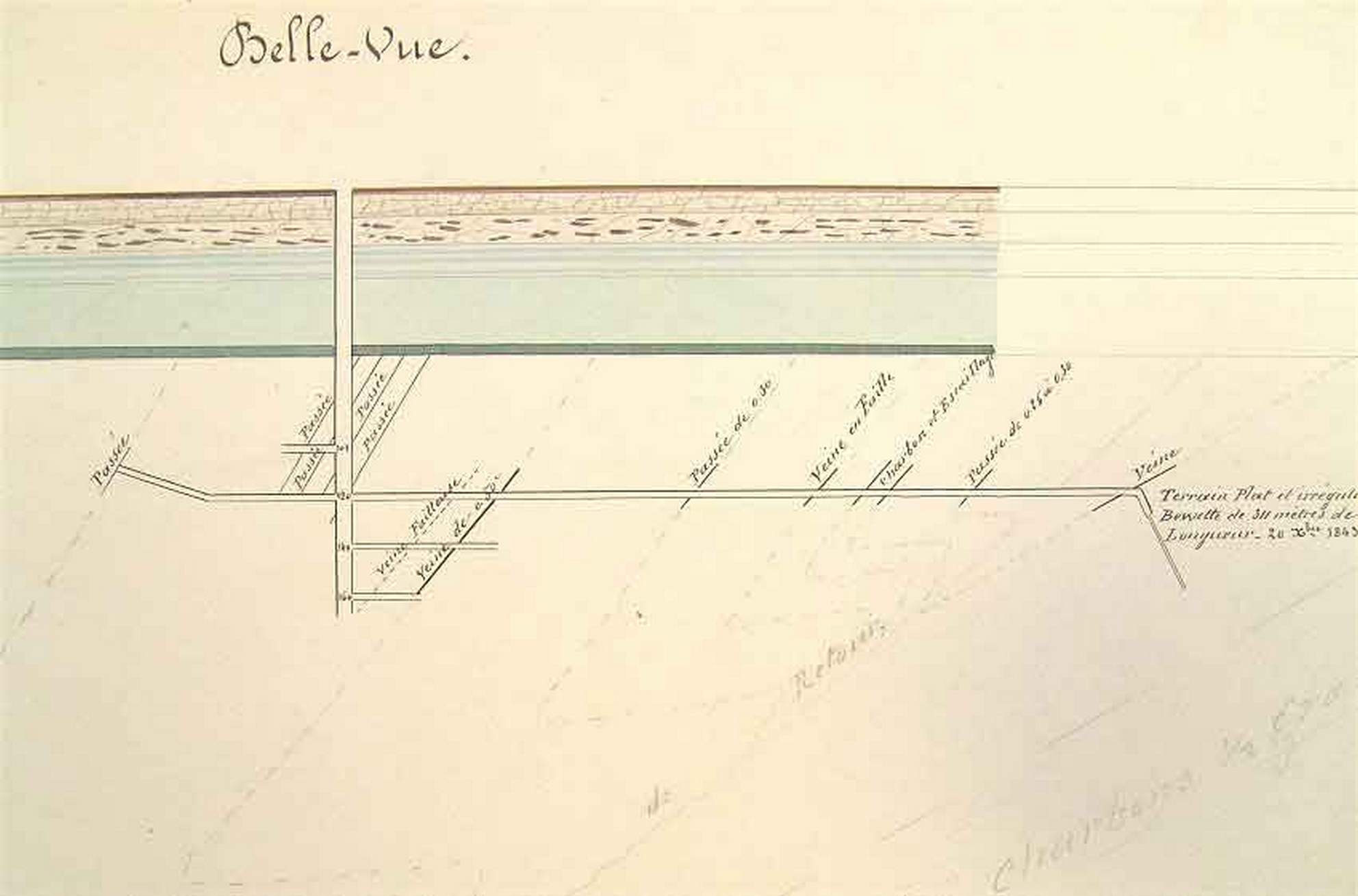 La fosse Bellevue de la Compagnie des mines d'Anzin était un charbonnage constitué d'un seul puits situé à Denain, Nord, Nord-Pas-de-Calais, France.